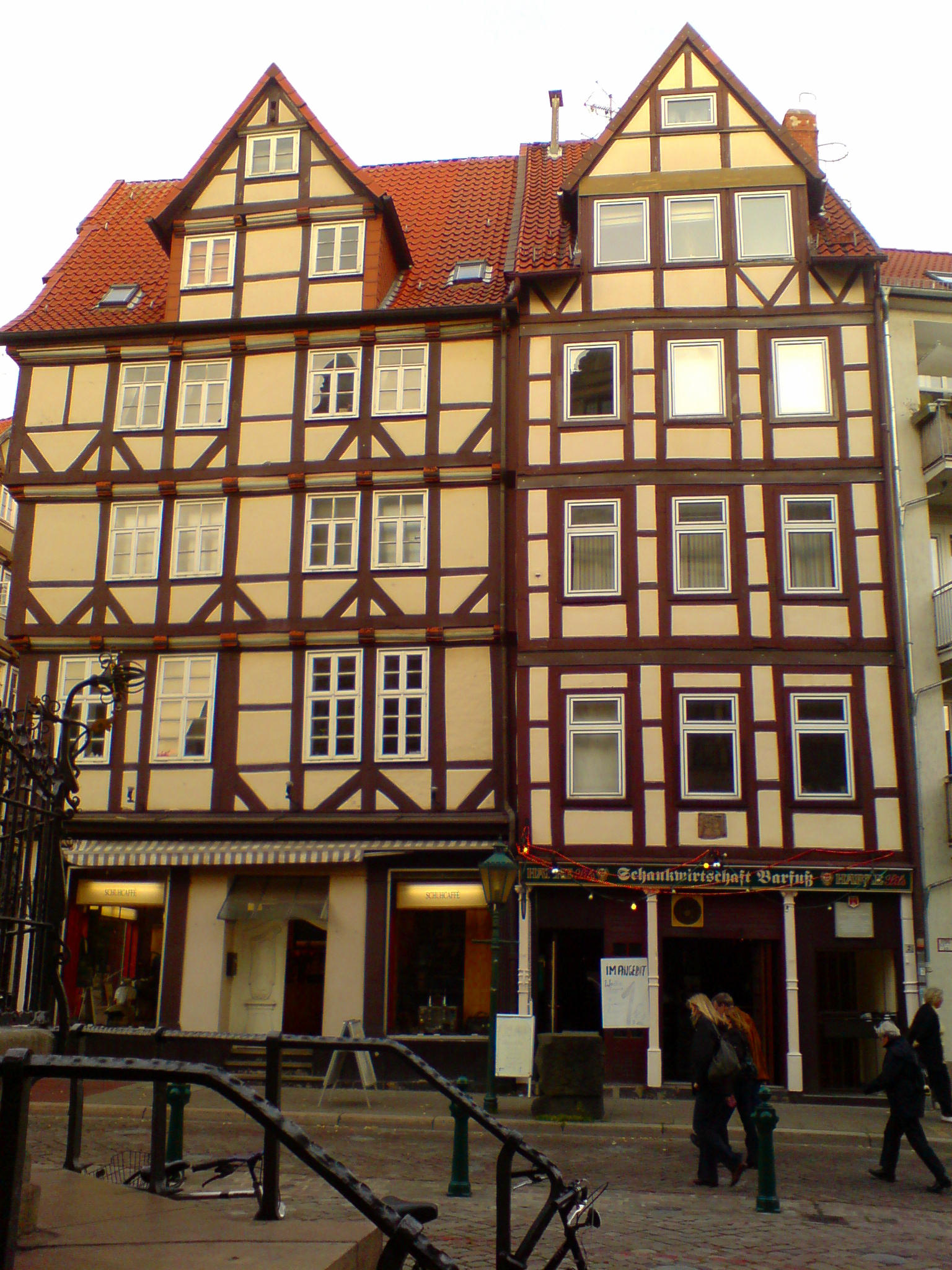 Geburtshaus Georg Heinrich Pertz in Hannovers Altstadt, Schuhmarkt Nr. 2 (rechts im Bild)